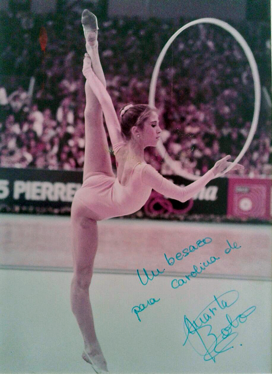 La gimnasta española Marta Bobo en el Campeonato Mundial de Gimnasia Rítmica de Estrasburgo en 1983.